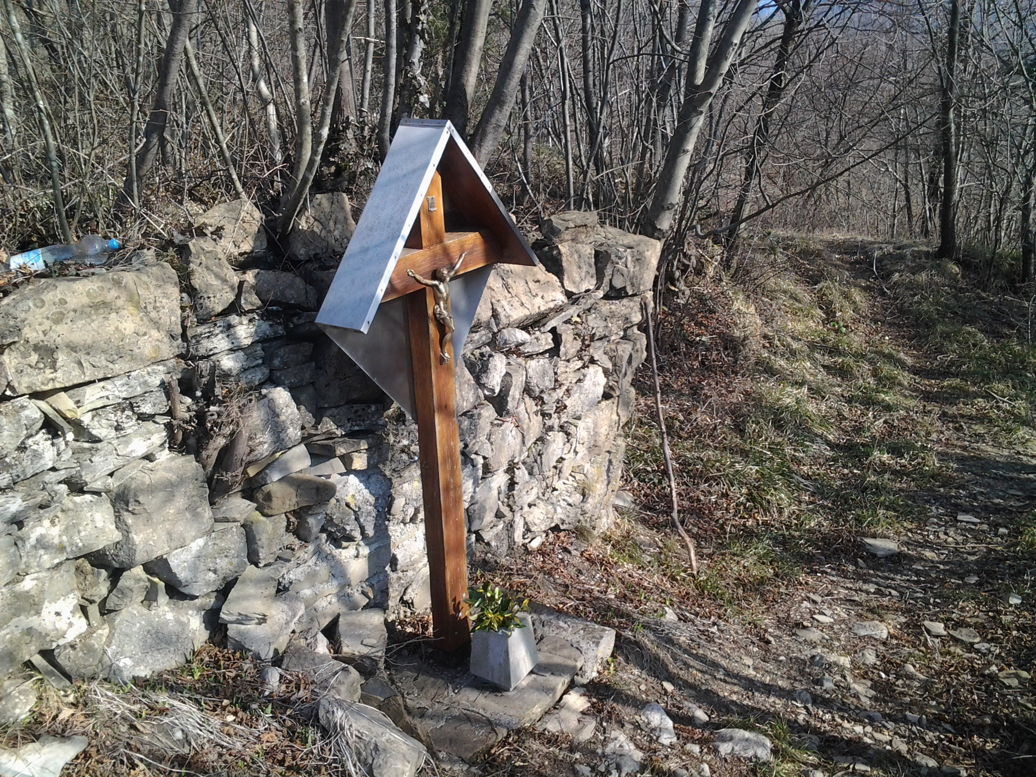 5210 Goljevica, Slovenia